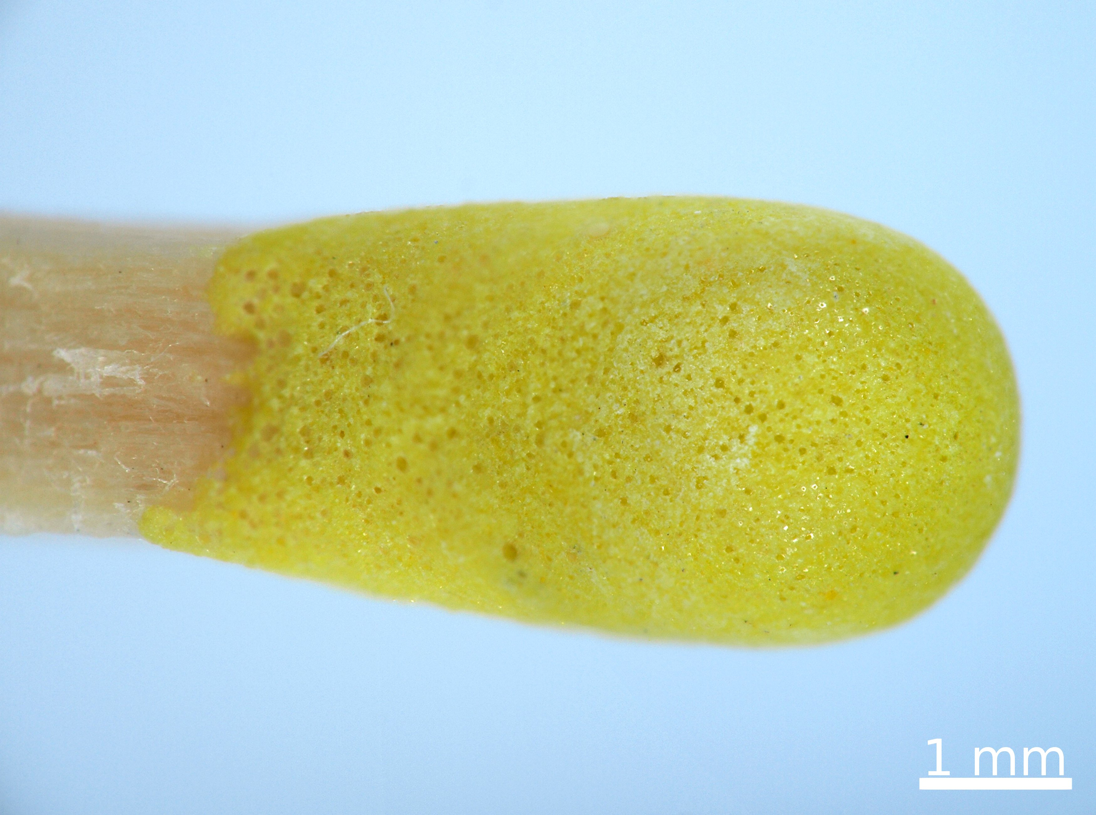 Streichholzkopf